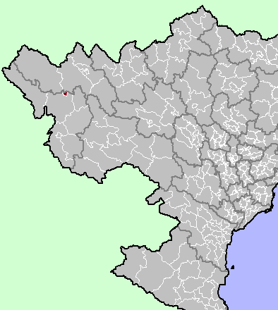 Muong Lay District, Dien Bien Province, Vietnam.